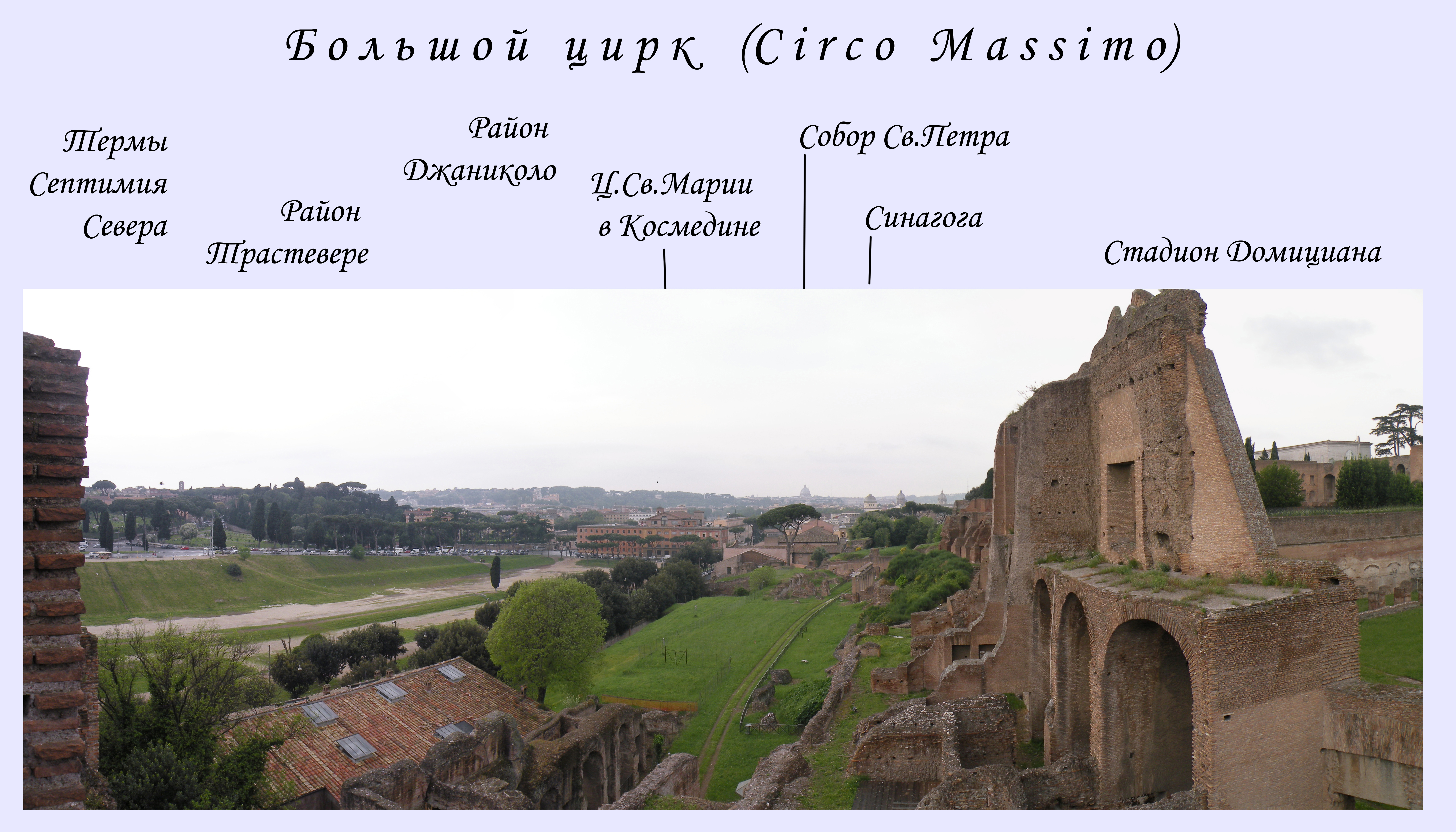 Рим.Большой цирк.Вид с Палатина на NW